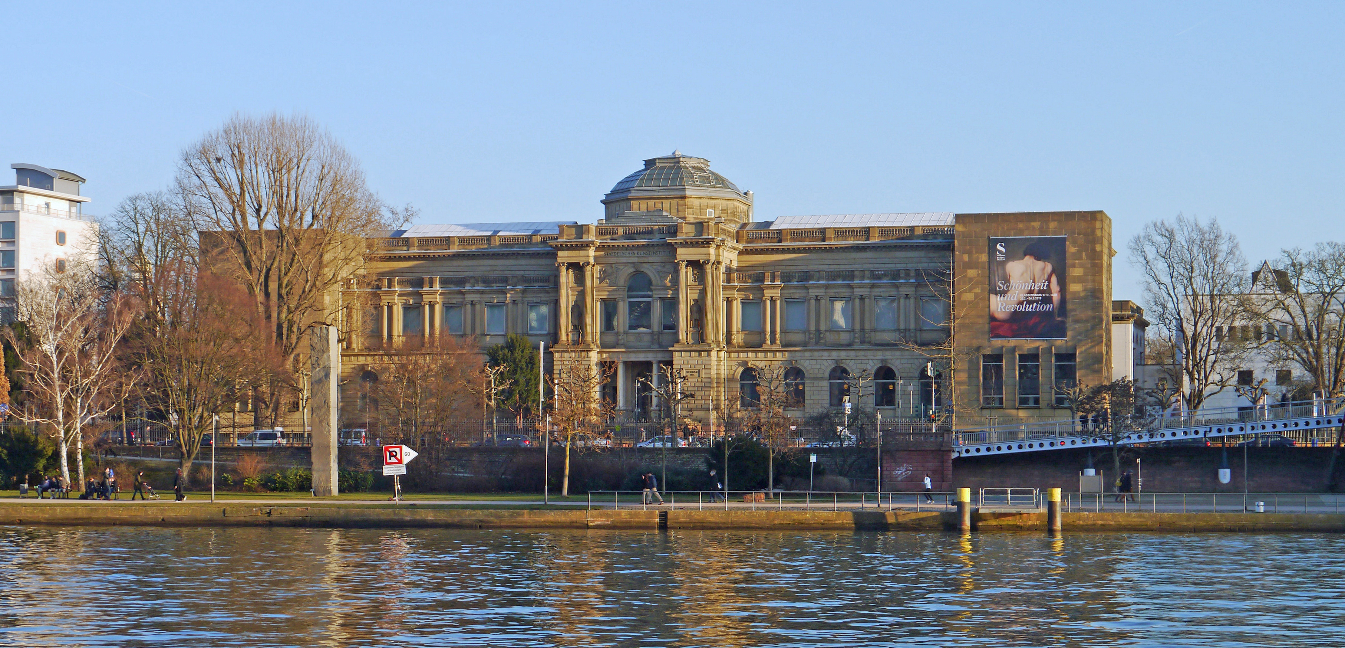 Das Städel in Frankfurt am Main.